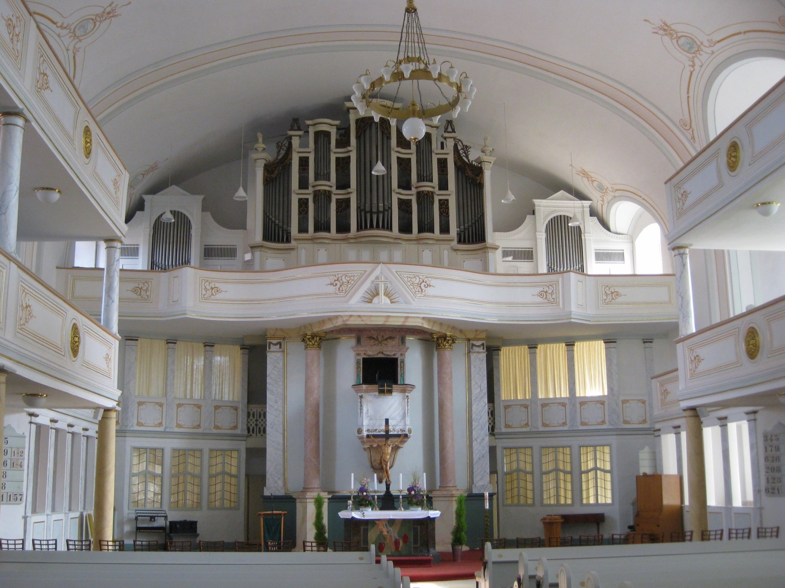 Orgel der Evangelische Stadtkirche Bad Salzungen